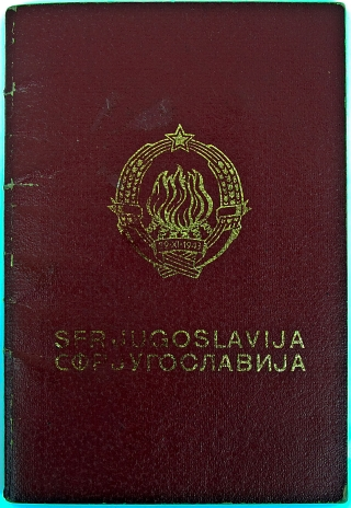 Pasoš SFR Jugoslavije izdan 1982